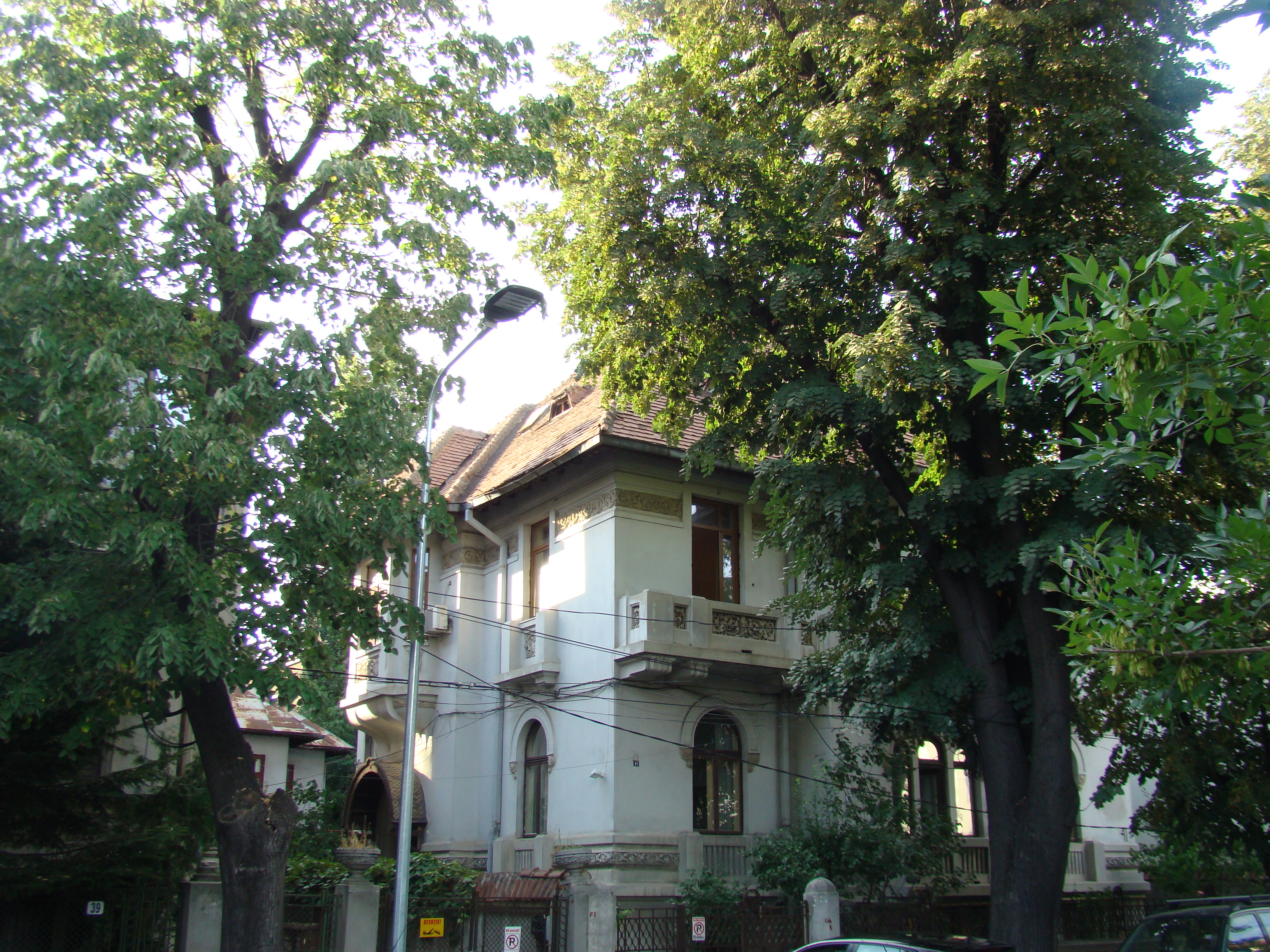 Clădire monument istoric, str. Paris, nr 41